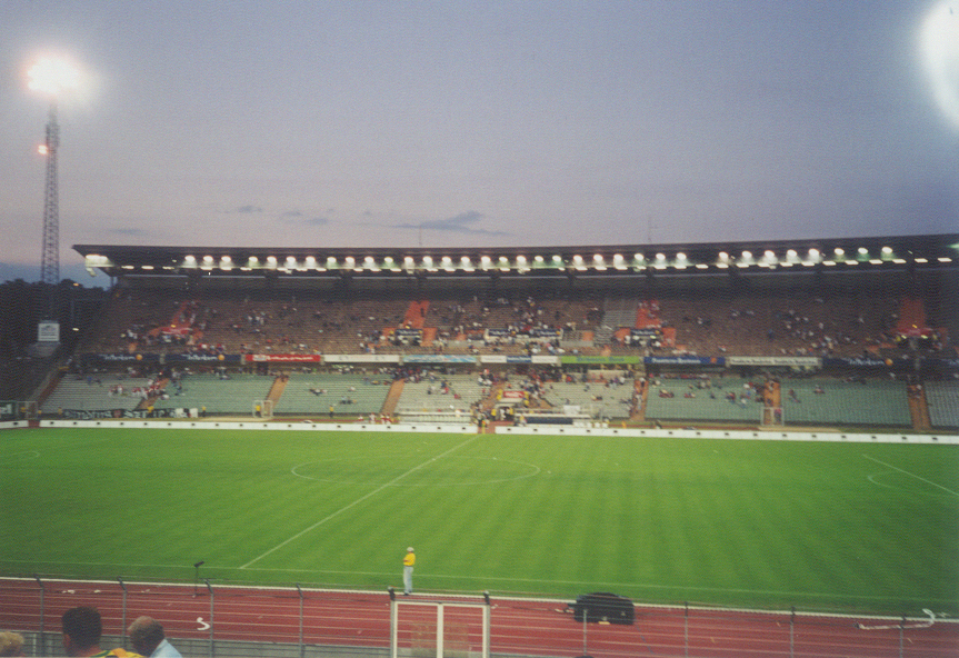 German 2. Bundesliga match Eintracht Frankfurt – Arminia Bielefeld (0:2), September 19th, 2001